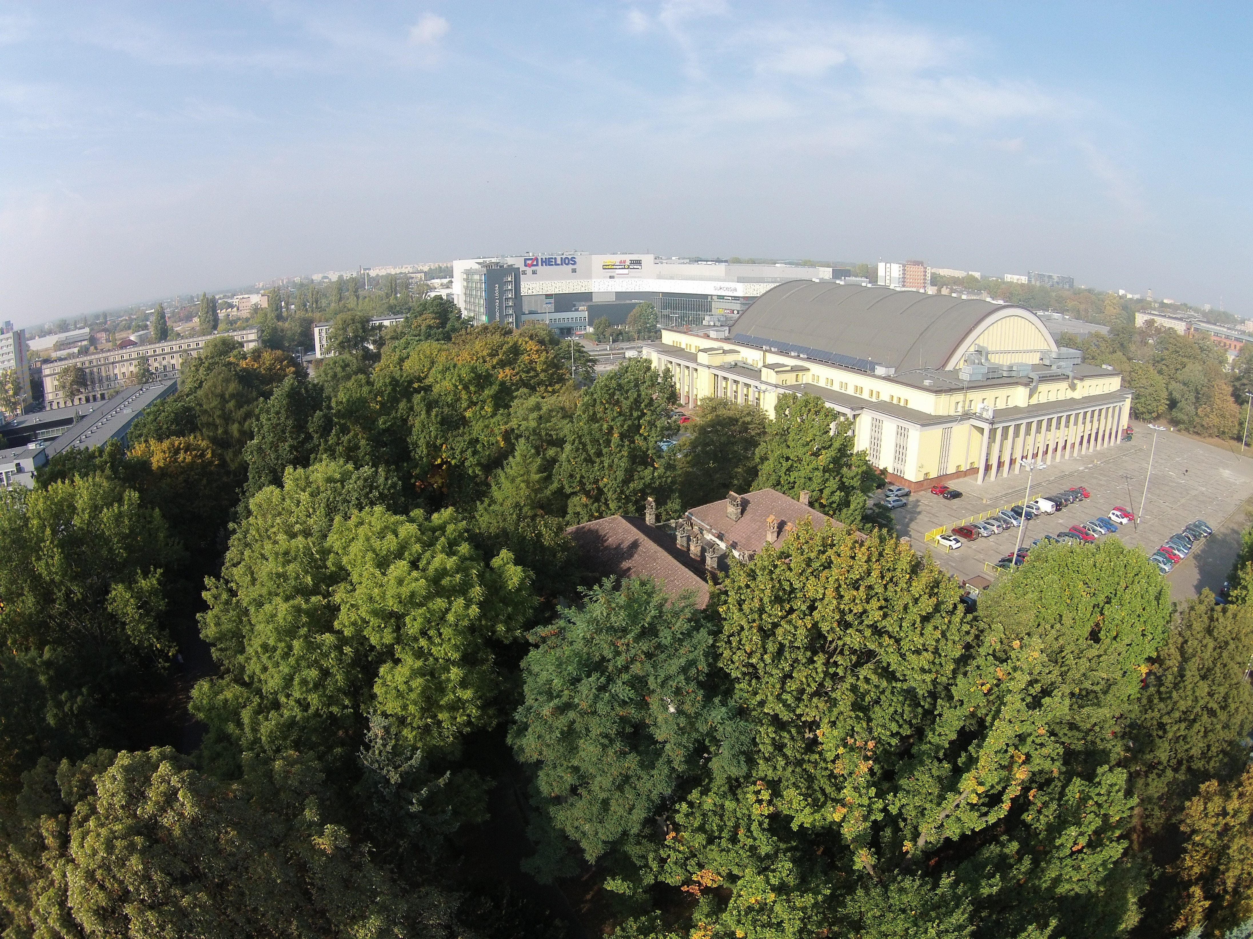 Hala Sportowa Miejskiego Ośrodka Sportu i Rekreacji w Łodzi – hala widowiskowo-sportowa w Łodzi przy ul. ks. Skorupki 21- filmowano Dji Phantom 3